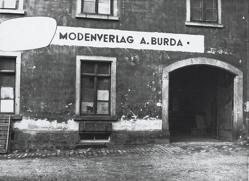 Die Fassade des „Modenverlags A. Burda“ 1949.